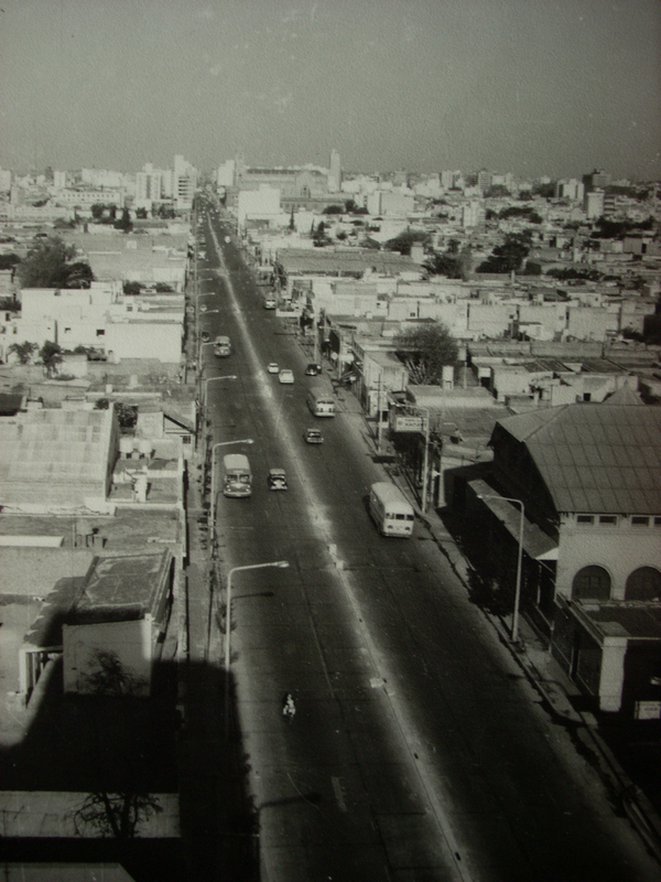 Av. Colón vista desde calle Arturo Orgaz hacia el centro a fines de los años ´60, Córdoba, Argentina